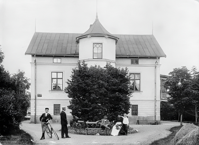 Familjen Bauers sommarhus vid Rocksjön i Jönköping.